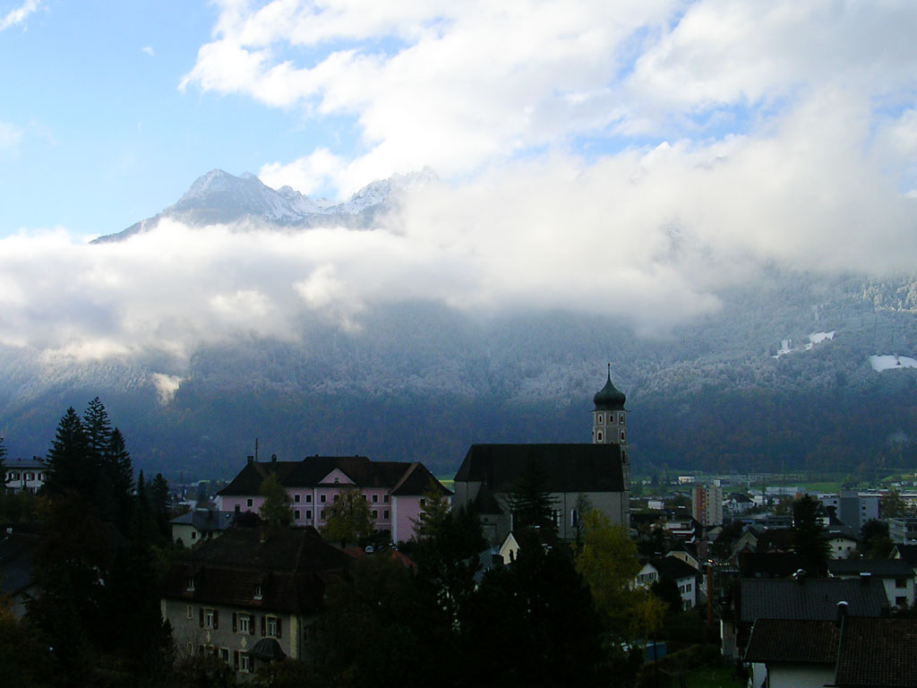 Blick über die Alpenstadt Bludenz mit dem Schloss Gaienhofen und der Laurentiuskirche oberhalb der Altstadt